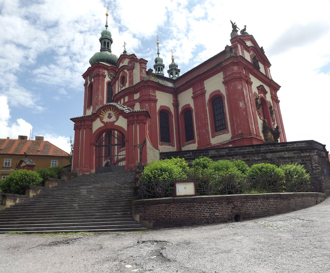 Zlonice (Bohmen) die Maria Himmelfahrt Kirche